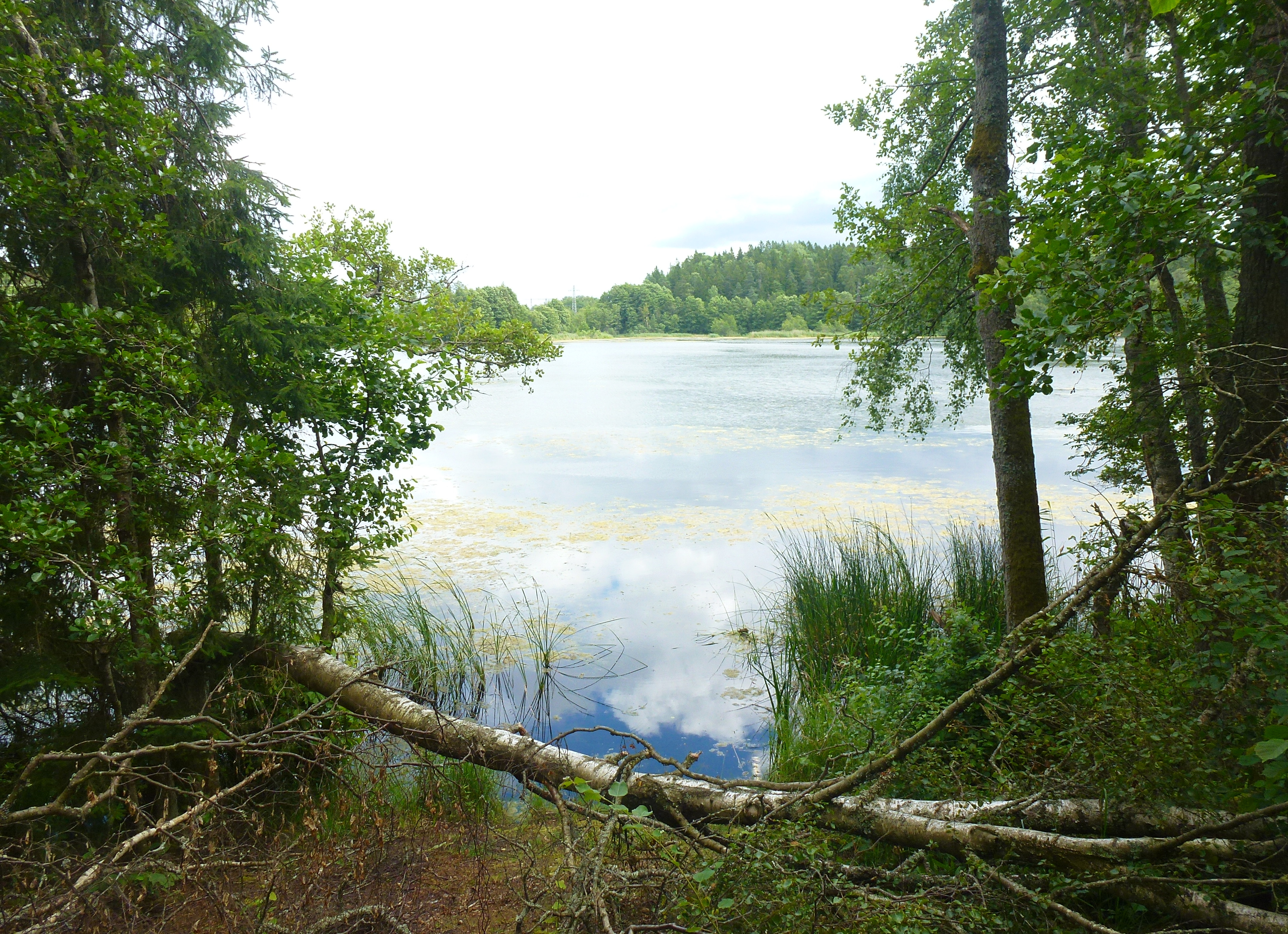 Sjön Ravalen, Sollentuna